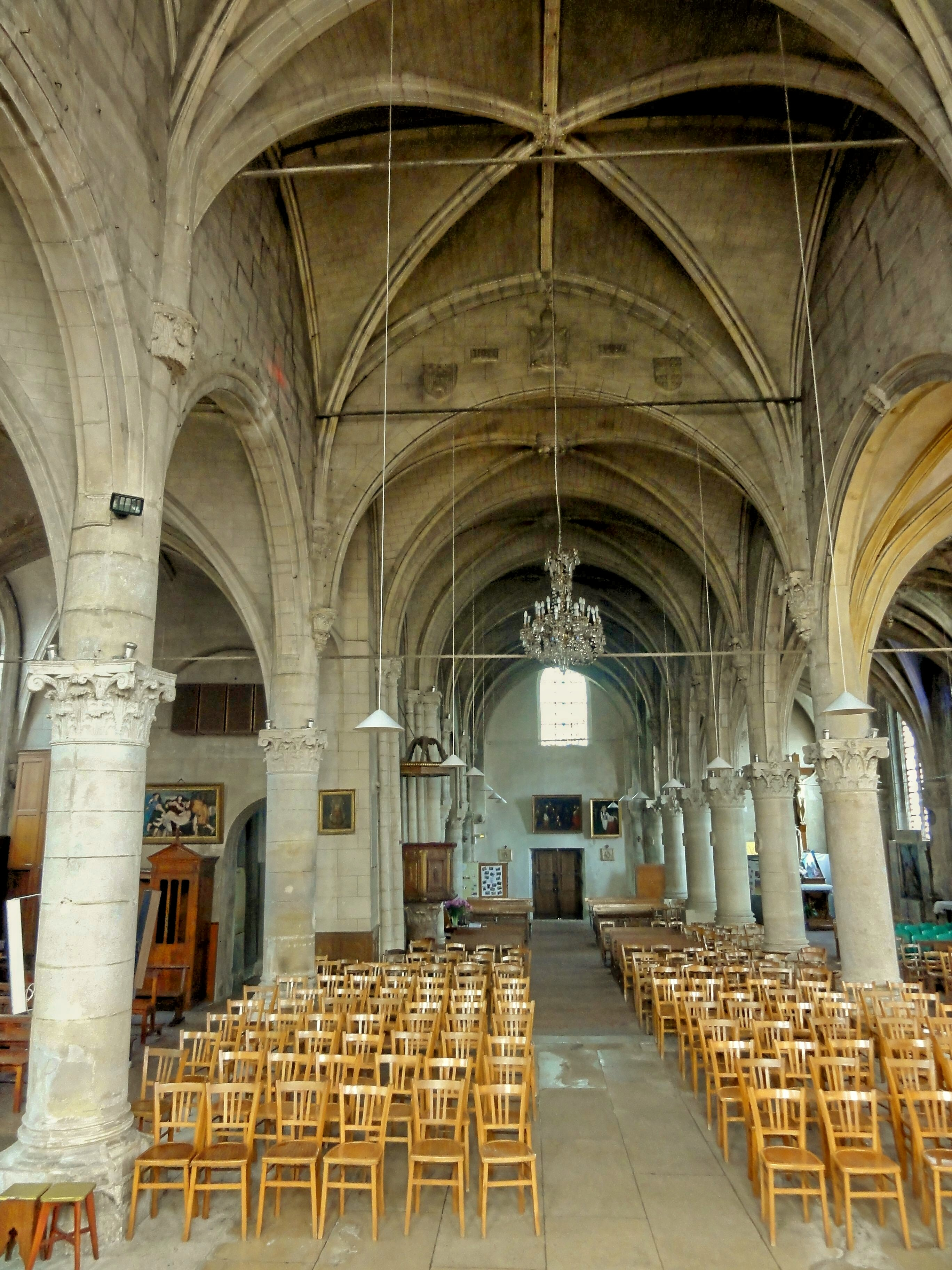 Nef, vue vers l'ouest.